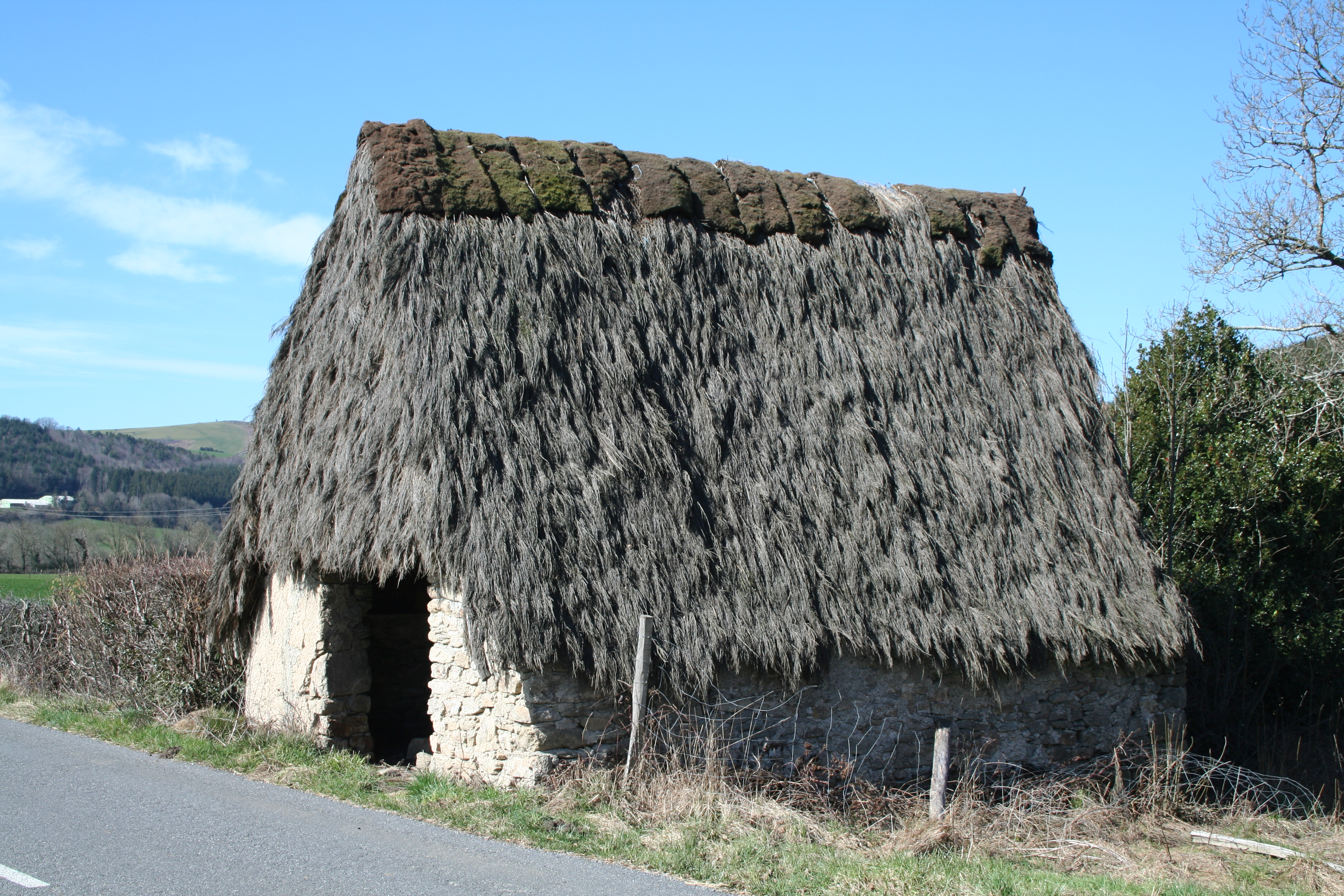 Murat-sur-Vèbre (Tarn, France) - Pailler traditionnel (près de Candoubre), avec son toit en genêts.